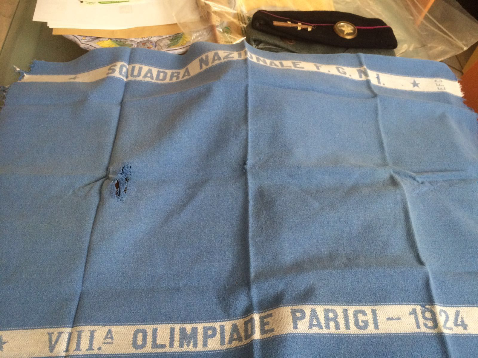 G.Mangante cimeli VIII Olimpiade